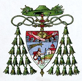 Hugo Gerhard Ströhl: "Heraldischer Atlas". Stuttgart 1899. Tafel 49, Kirchliche Heraldik, Bild 4, Wappen Luigi Piavi, Patriarch von Jerusalem